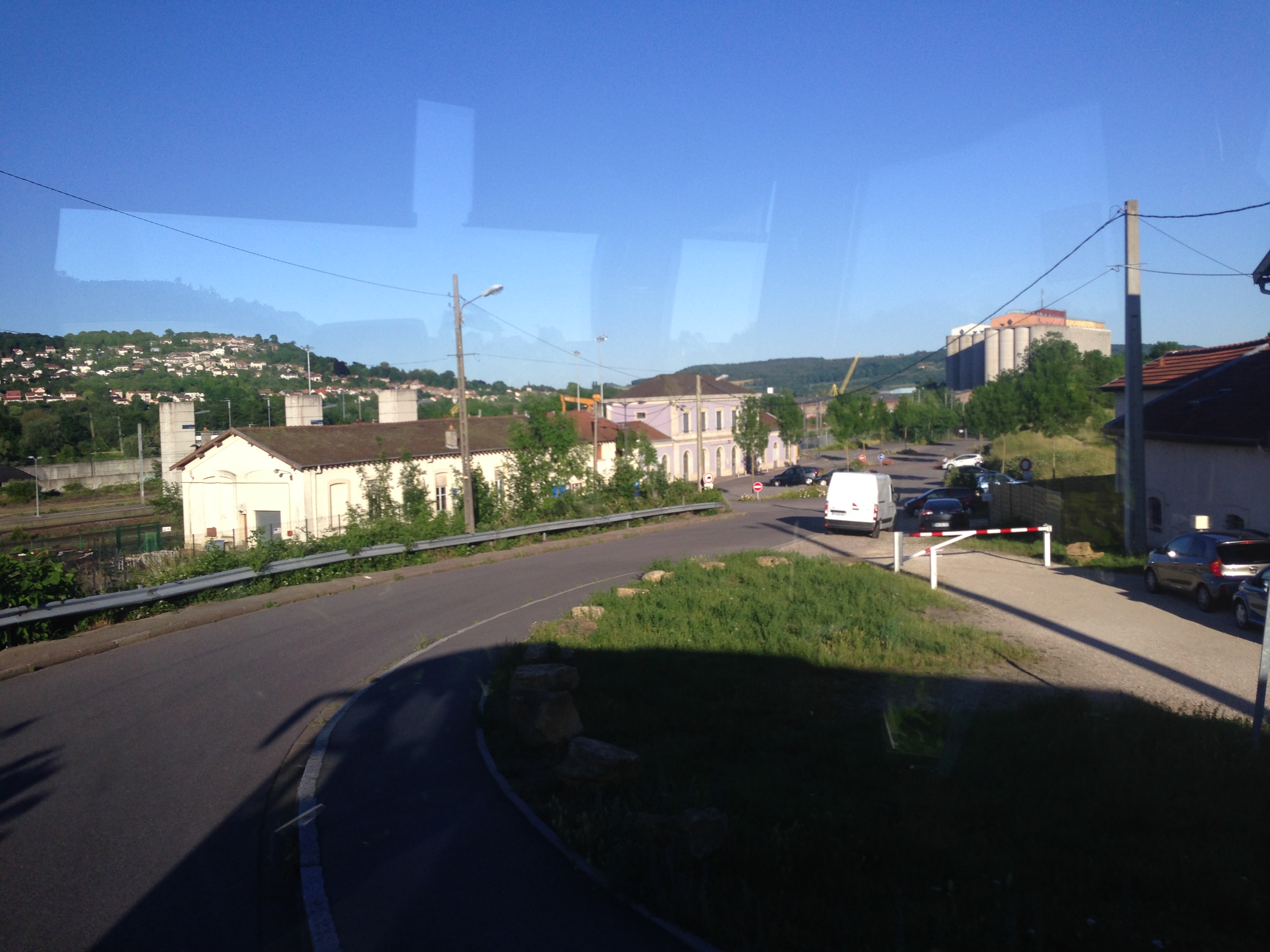 Gare de Frouard - vue sur un autobus